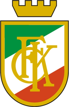 Vereinswappen des Kronen-Club Cannstatt, der mit dem FV Stuttgart zum VfB Stuttgart fusionierte.